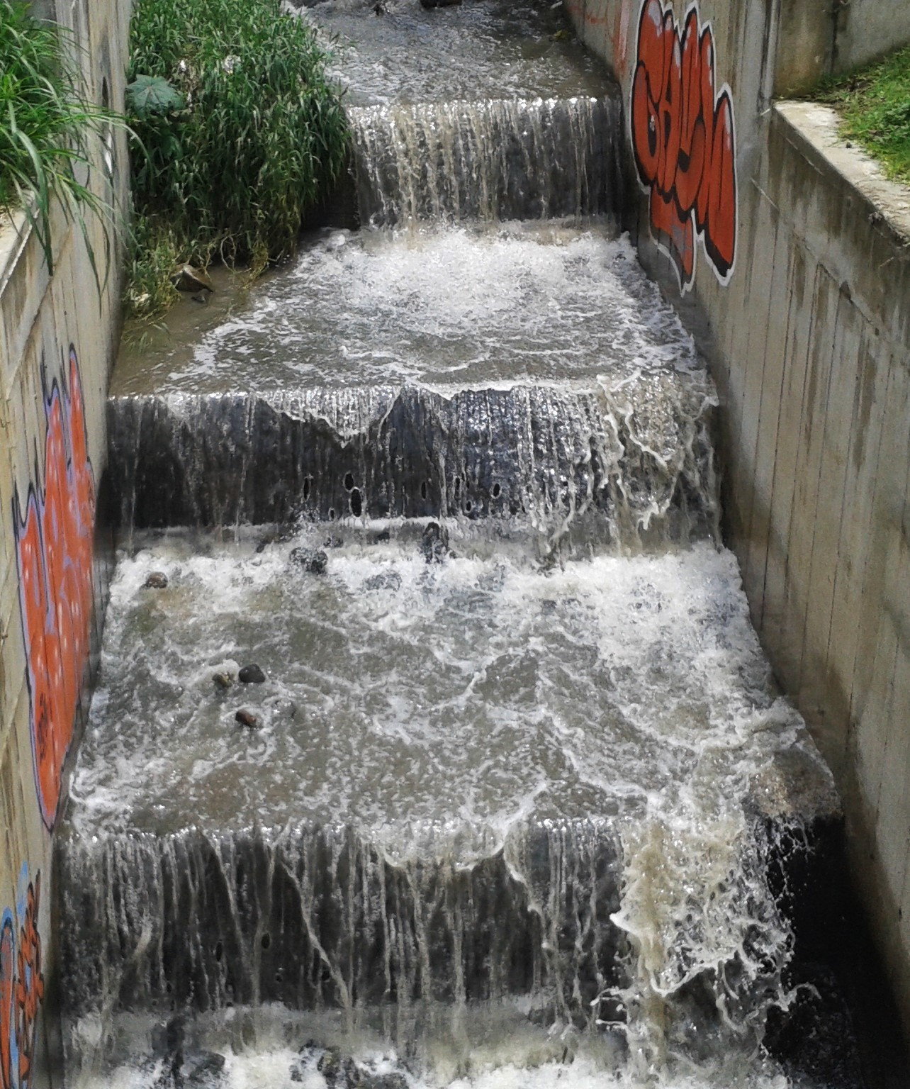 Quebrada Malpaso, Carrera 80, Medellín